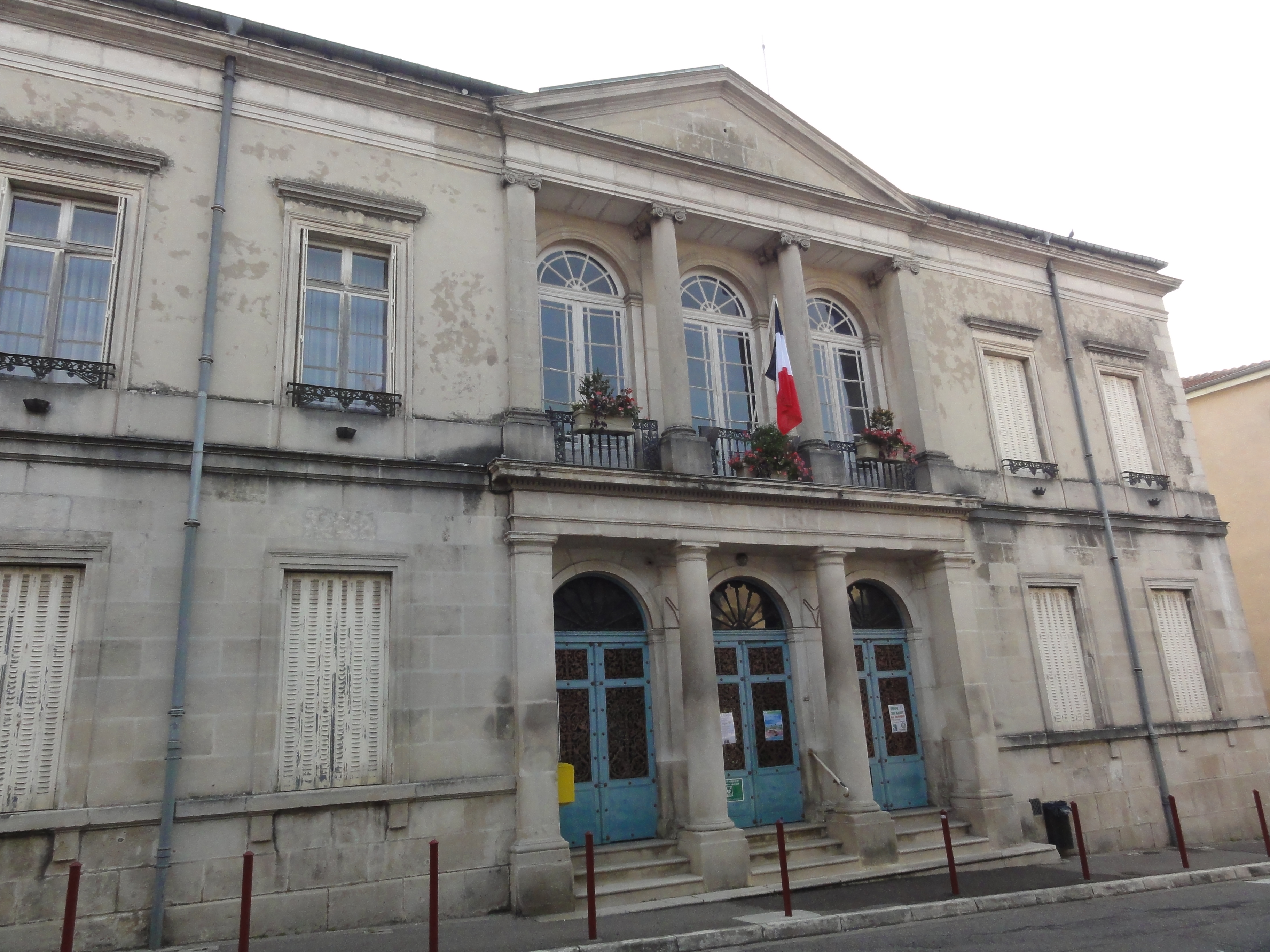 Foug (Meurthe-et-M.) mairie